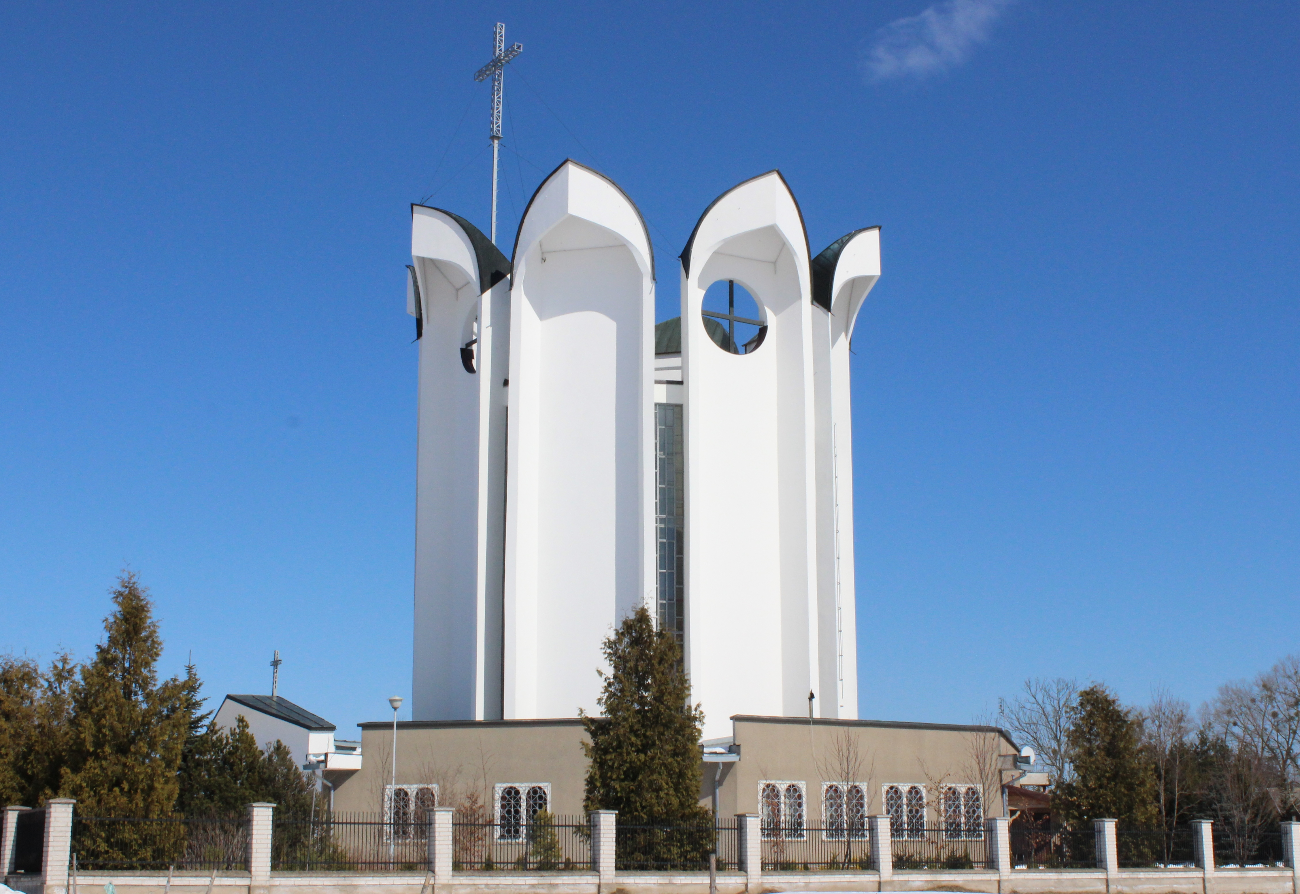 Parafia Rzymsko-Katolicka p.w. św. Maksymiliana Kolbe w Kolnicy